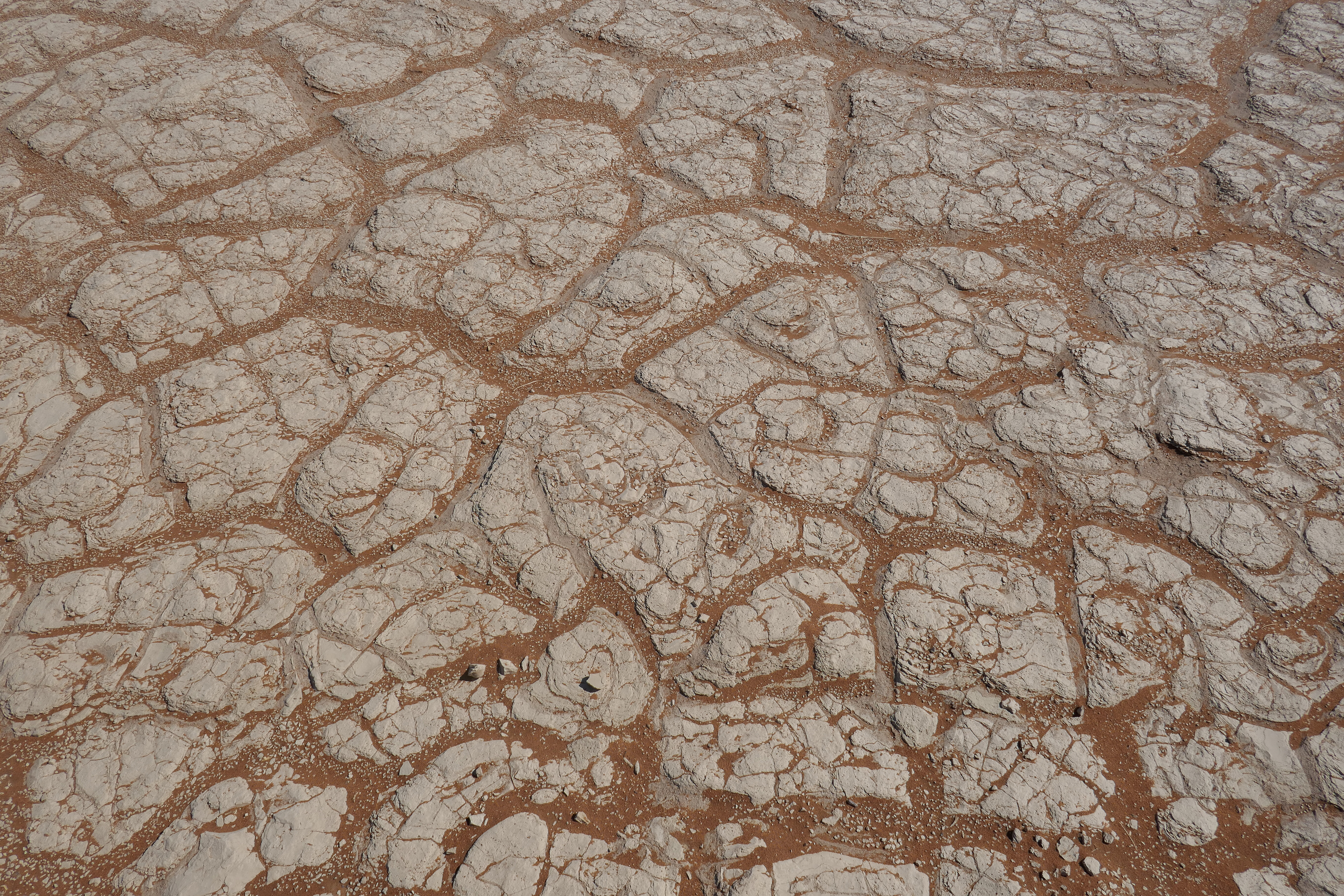 Sol argileux à Sossusvlei (désert du Namib, Namibie).